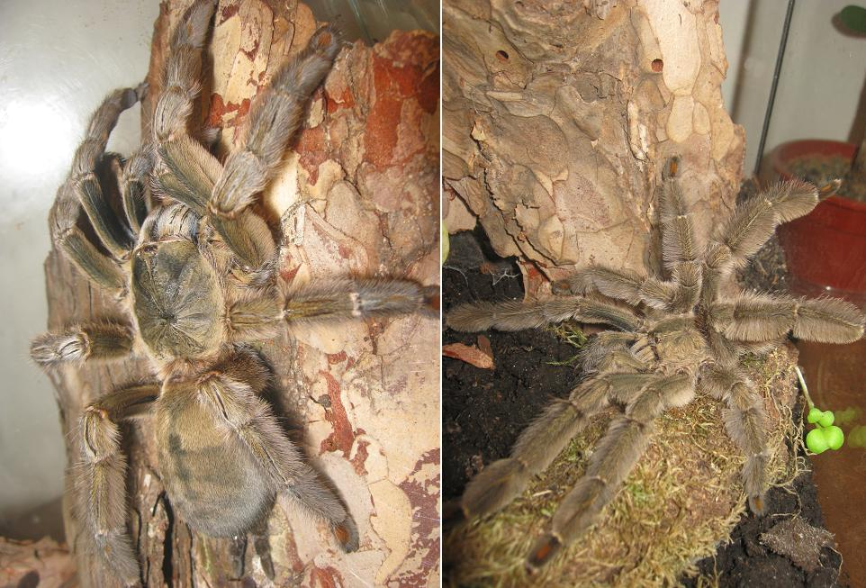 Ivari dimorfizmus szemléltetése P. cambridgei fajon